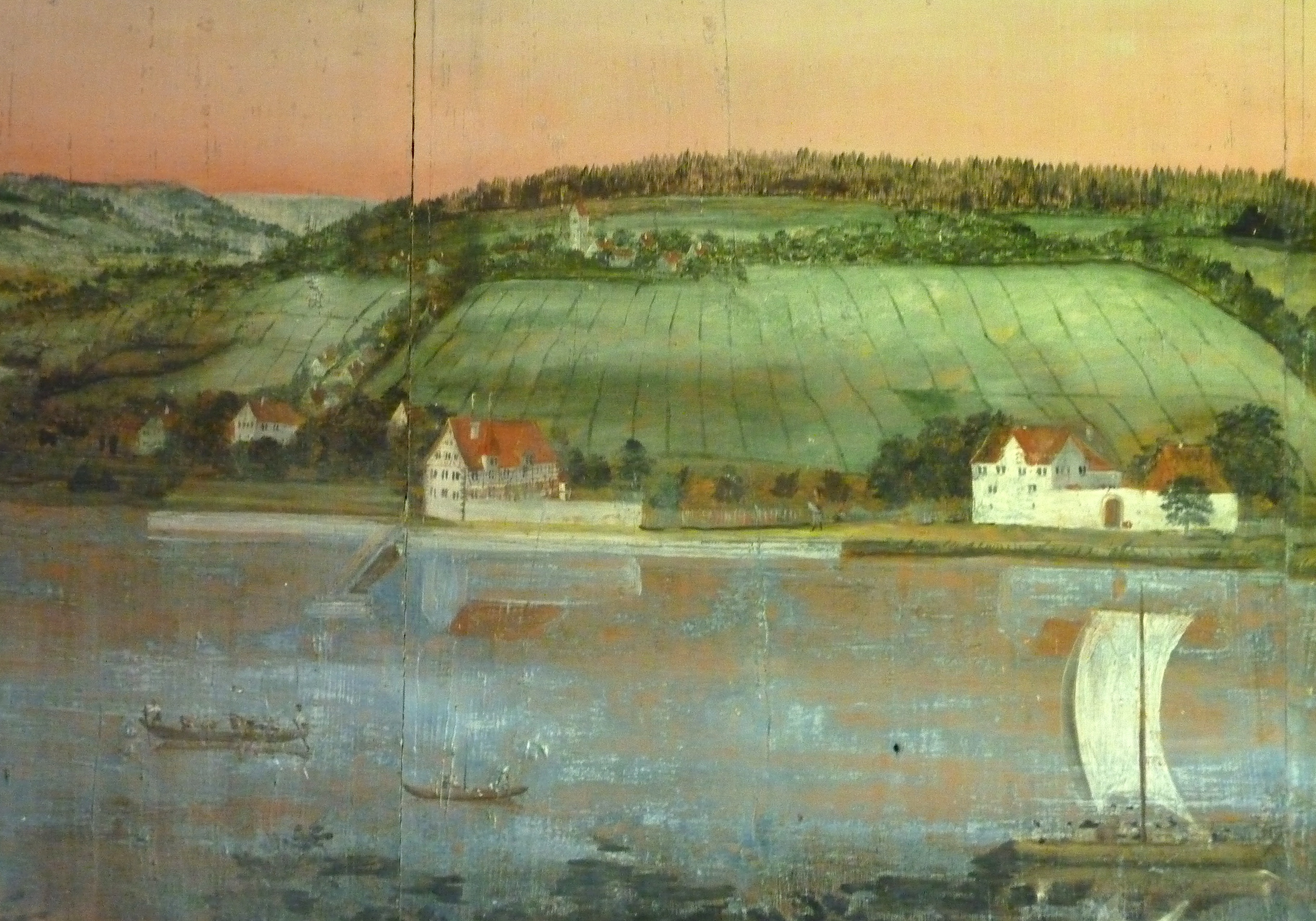 Traubenberg (Zollikon) auf einem Wandgemälde im Ritterhaus Bubikon; Stöffi Kuhn dem Jüngeren (1731 - 1792) zugeschrieben